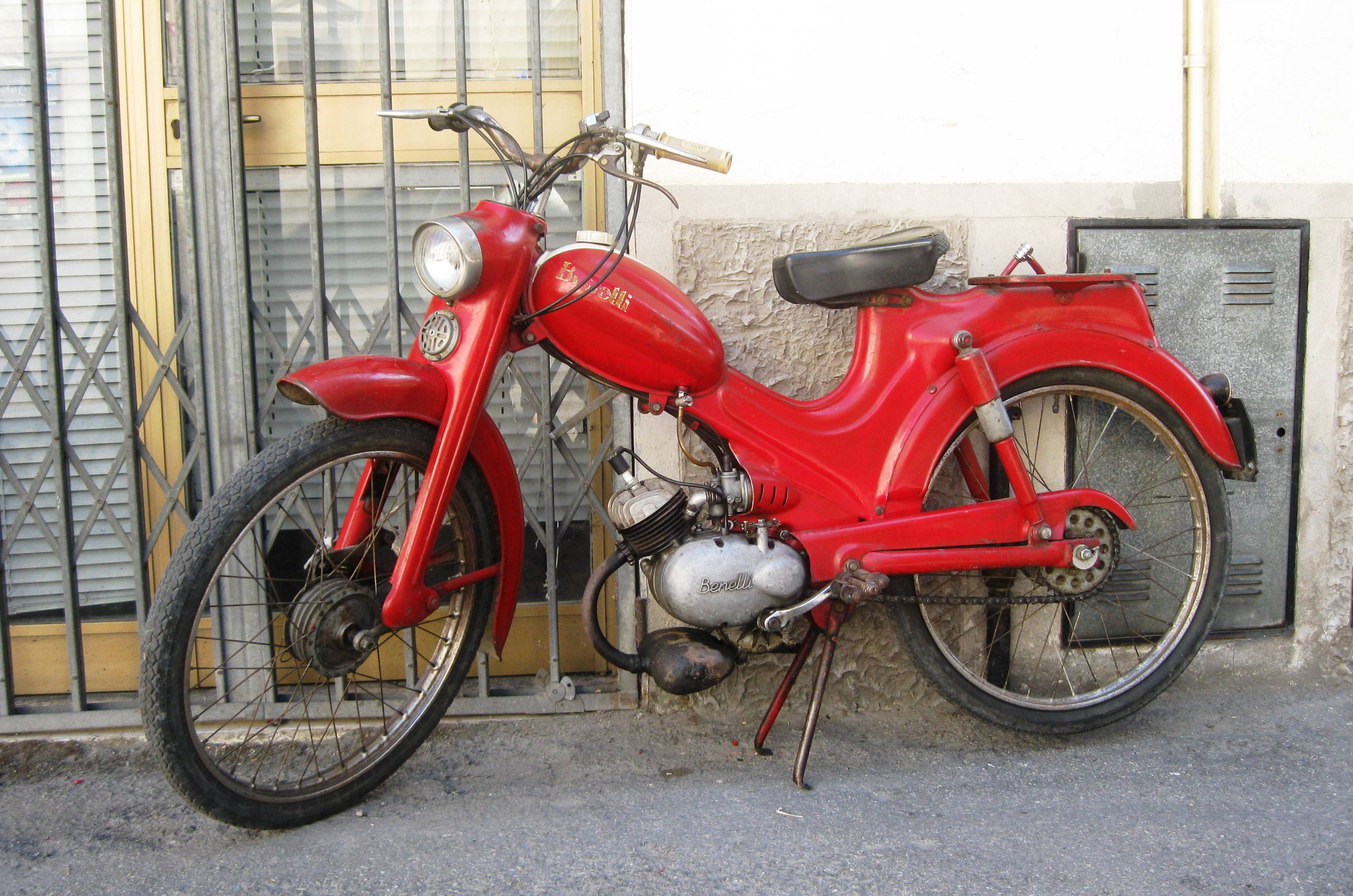 Benelli 48 ("Ciclomotore") scattata a Modigliana